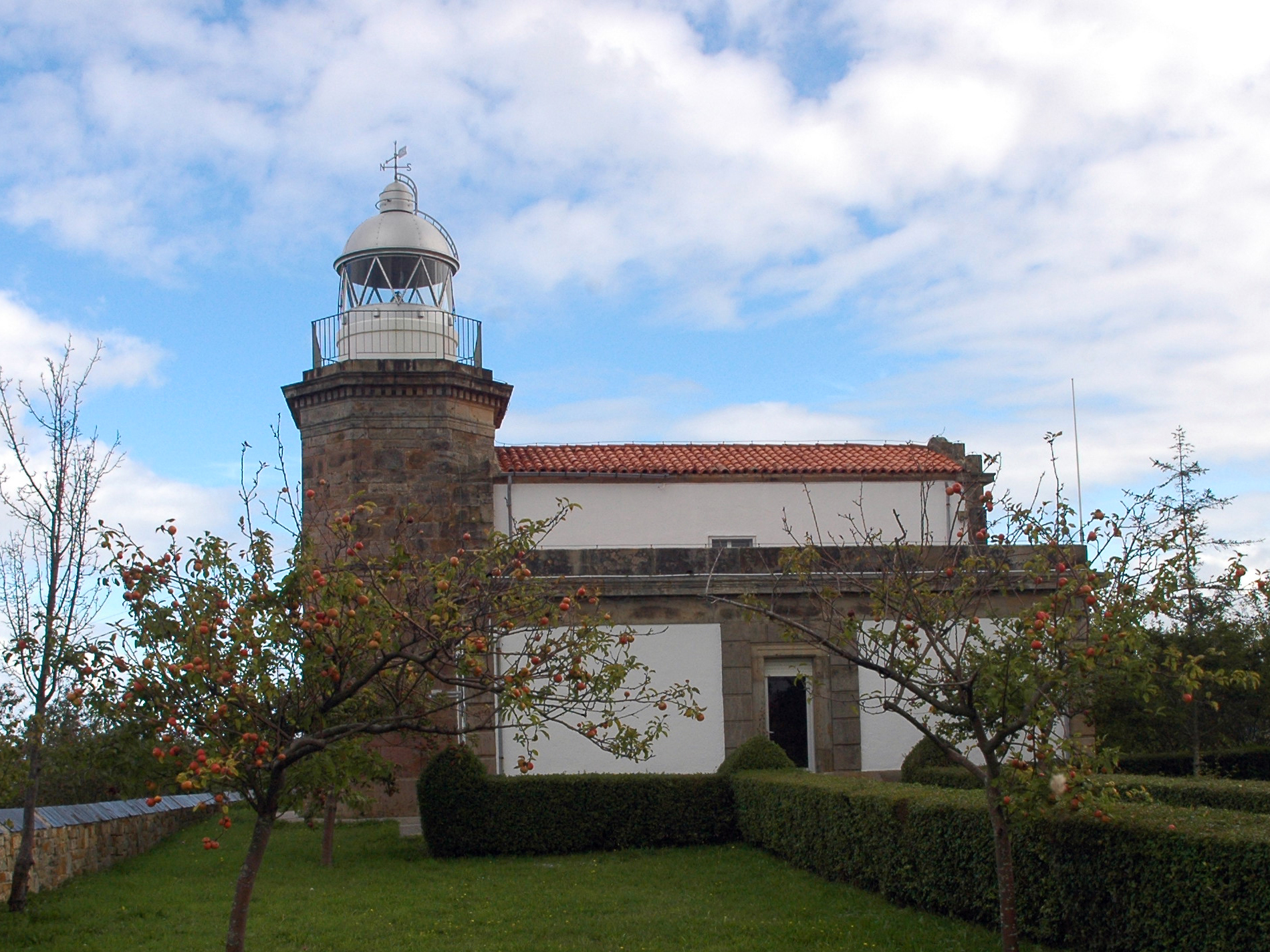 Faro de Tazones Autor: Ramón Noriega